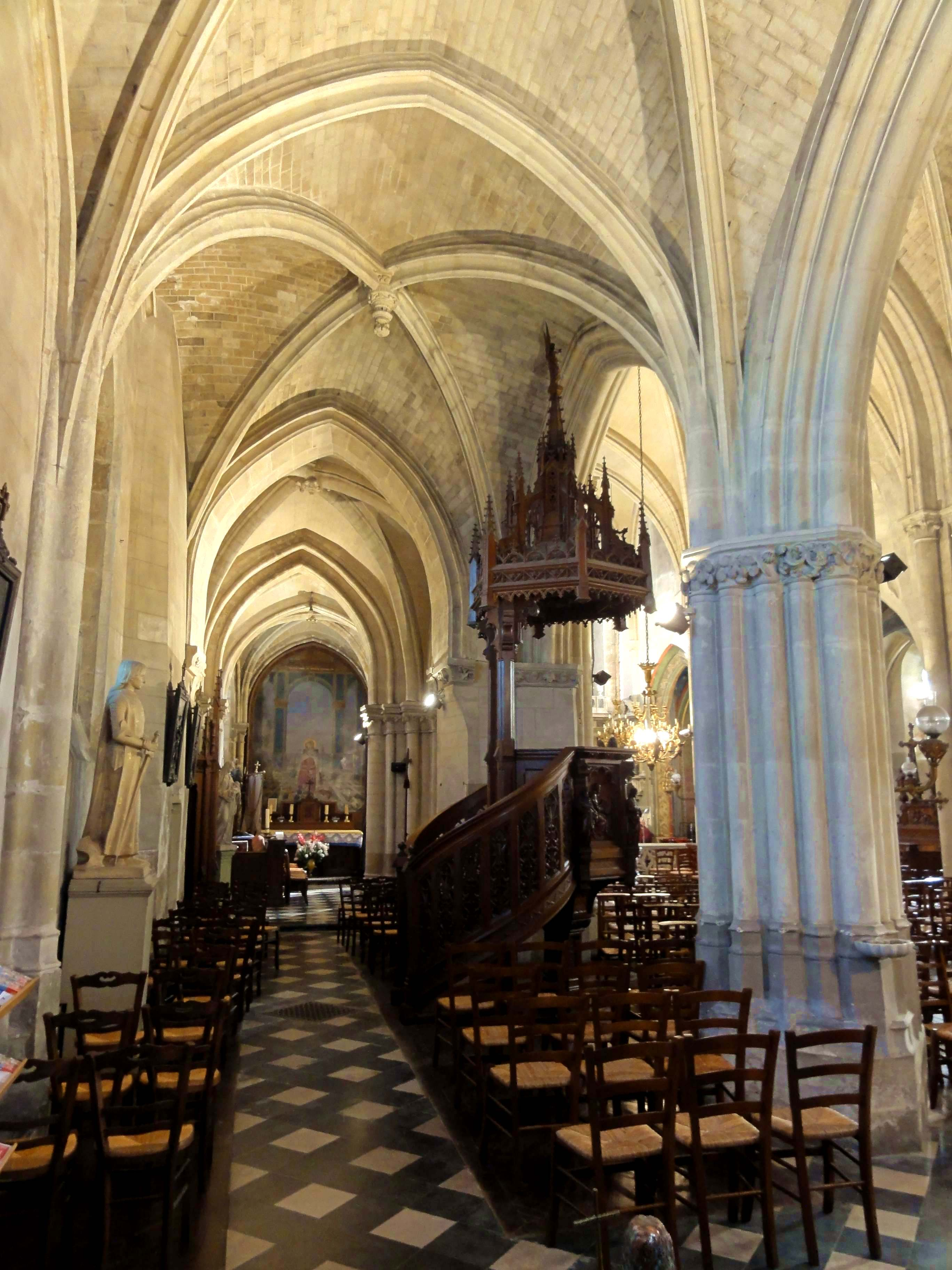 Voir titre.